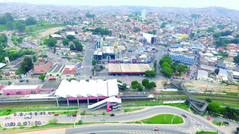 Visão aérea da cidade de Jandira a partir da área central